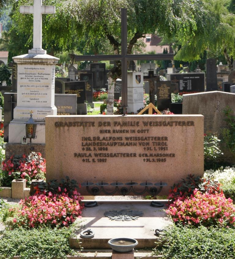 Grab des ÖVP-Politikers Alfons Weißgatterer (1898-1951) auf dem Westfriedhof Innsbruck